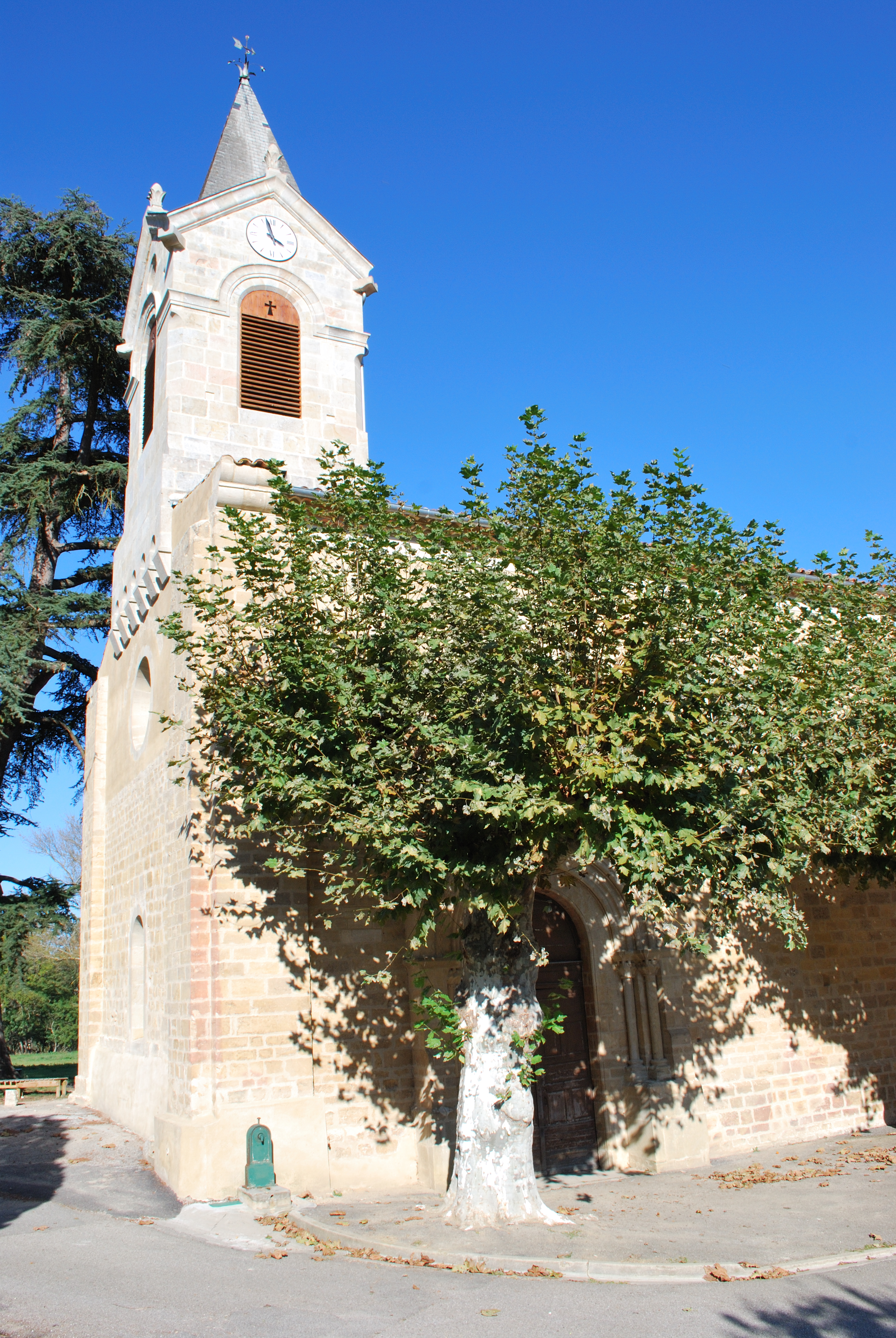 Eglise romane ancien prieuré qui fut certaiement à l'origine du village